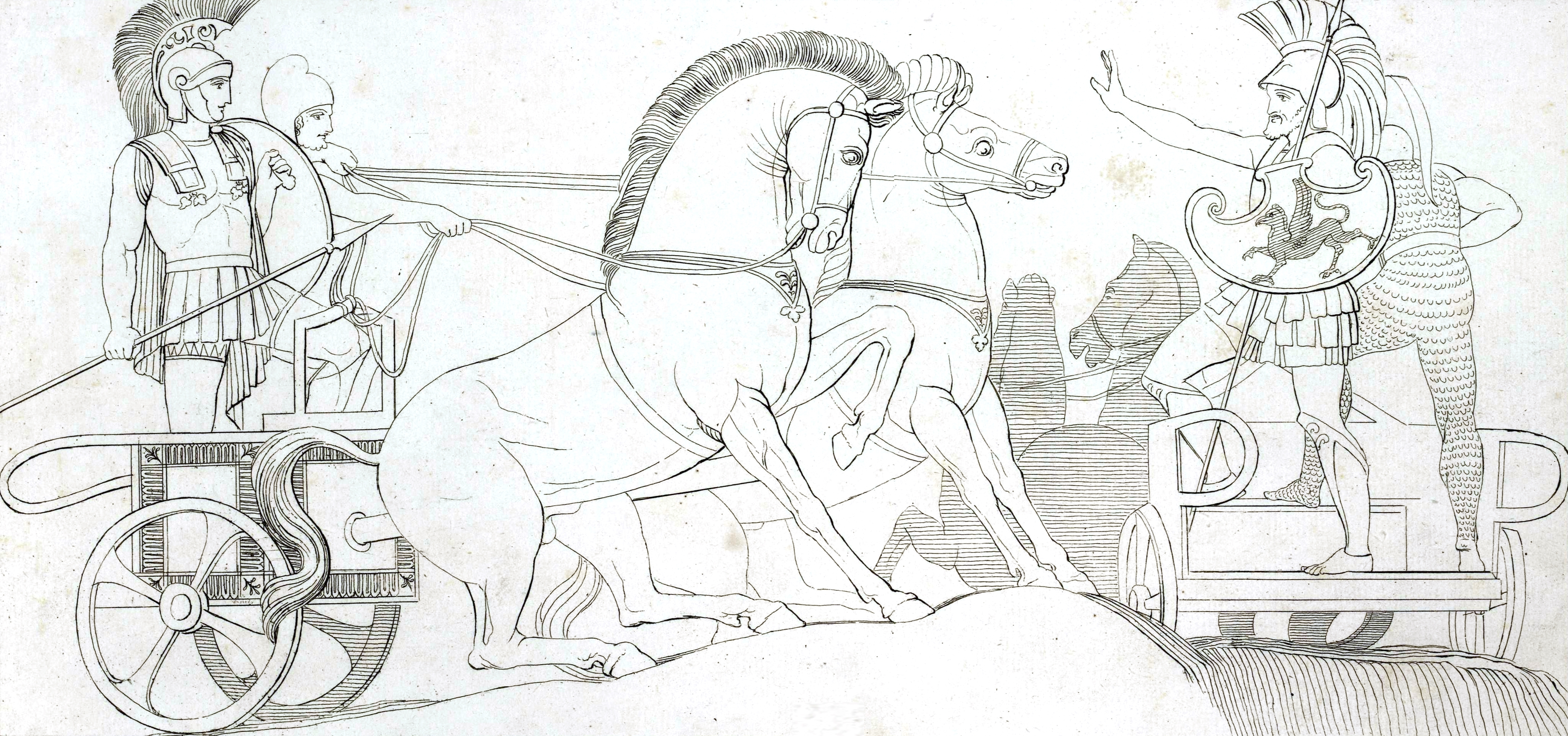 La Ilíada (Luis Segalá y Estalella)